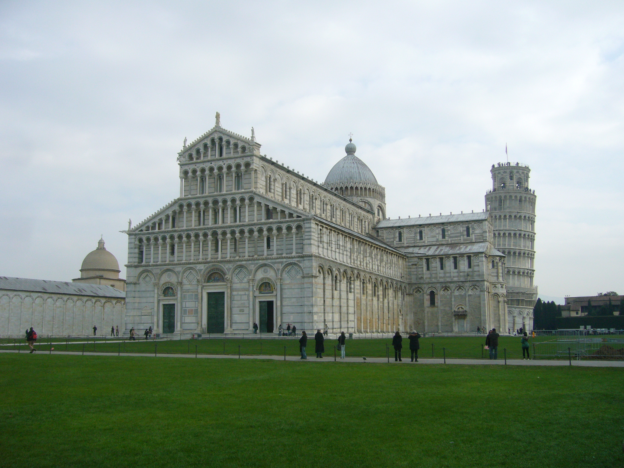 Cathédrale de Pise Campo dei Miracoli